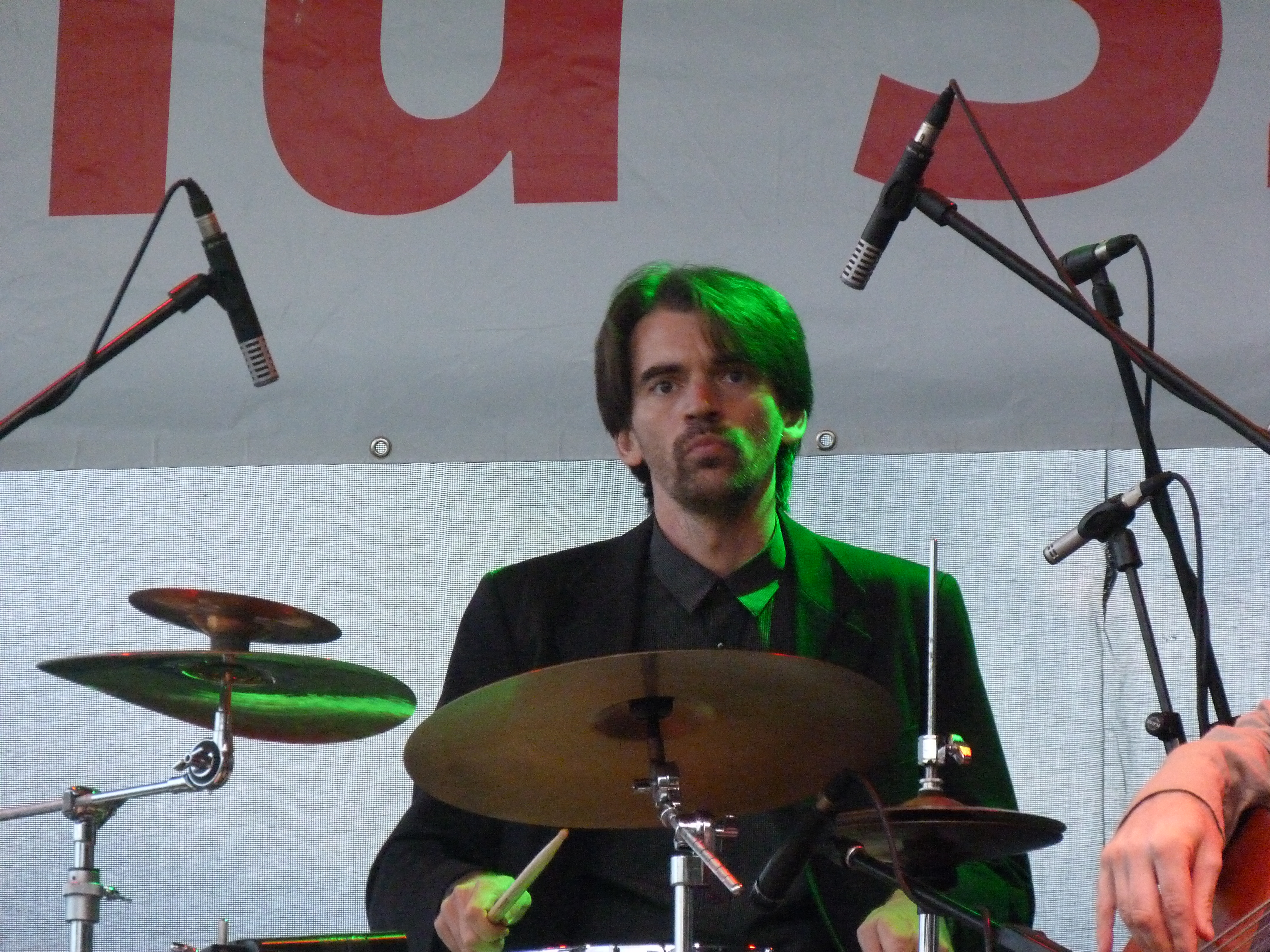 A felvétel 2014. szeptember 12-én, pénteken készült Budapesten, a 23. Budavári Borfesztiválon. Nagyszínpad, a Makám együttes és vendégei. Az együttes tagjai: Krulik Zoltán - gitár Korzenszky Klára - ének Kuczera Barbara – hegedű, vokál Boros Attila - basszusgitár Eredics Dávid - fúvós hangszerek Keönch László - ütőhangszerek Mohai György - hangmérnök ( Szalóki Ágnes, Lovász Irén. Bognár Szilvia: Katona sirató KATONA SIRATÓ MAKÁM BOGNÁR SZILVIA MIHI 2014 Források Bor és Pia borpiaci szakmai magazin 2014. augusztus Borfesztivál Melléklet 23. Budavári Borfesztivál kiállítási tájékoztató ©© Derzsi Elekes Andor, Budapest, 2014, A kép és filmfelvételek egészben, vagy részletekben másolását, bármilyen úton történő sokszorosítását és felhasználását a szerző ellenérték nélkül, jogutódjaira is kihatóan megengedi. Az engedély kiterjed a kereskedelmi célú hasznosításra is. Kéri azonban nevének feltüntetését a felhasználás során. A Metapolisz sorozat valamennyi képe és filmje Creative Commons alatti valamint kereskedelmi - for profit - célra is felhasználható. Ajánlott hivatkozás: Derzsi Elekes Andor: Metapolisz DVD line